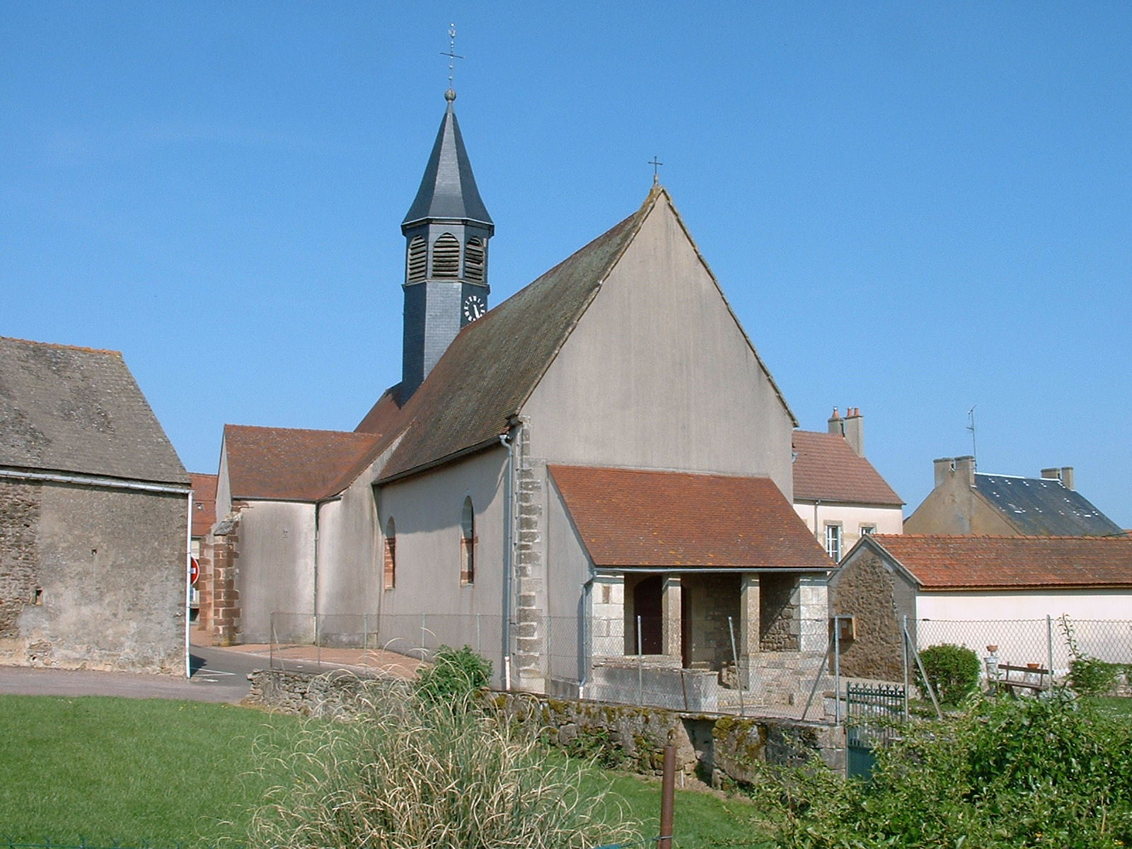 Église de Sainte-Magnance, Yonne